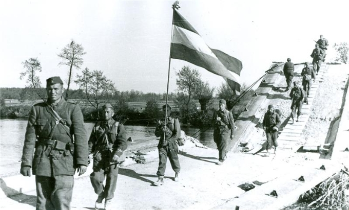 Prehod V. prekomorske brigade čez Kolpo.